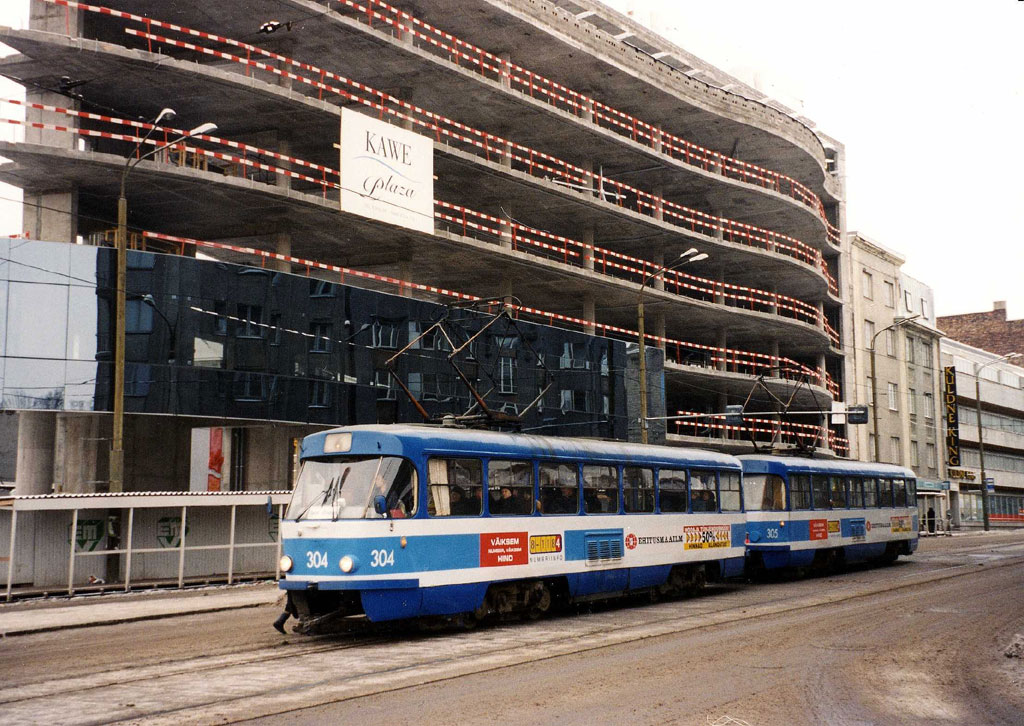 Kawe Plaza Tallinnas.